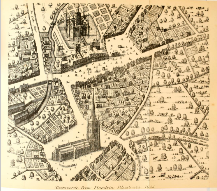 Château de Steenvoorde dans le Flandira Ilustrata